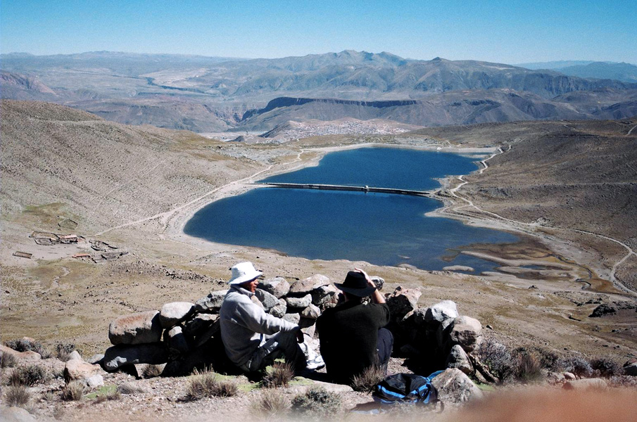 Vista panorámica de las lagunas Kari Kari ubicadas cerca de la ciudad de Potosí (fondo) en Bolivia.